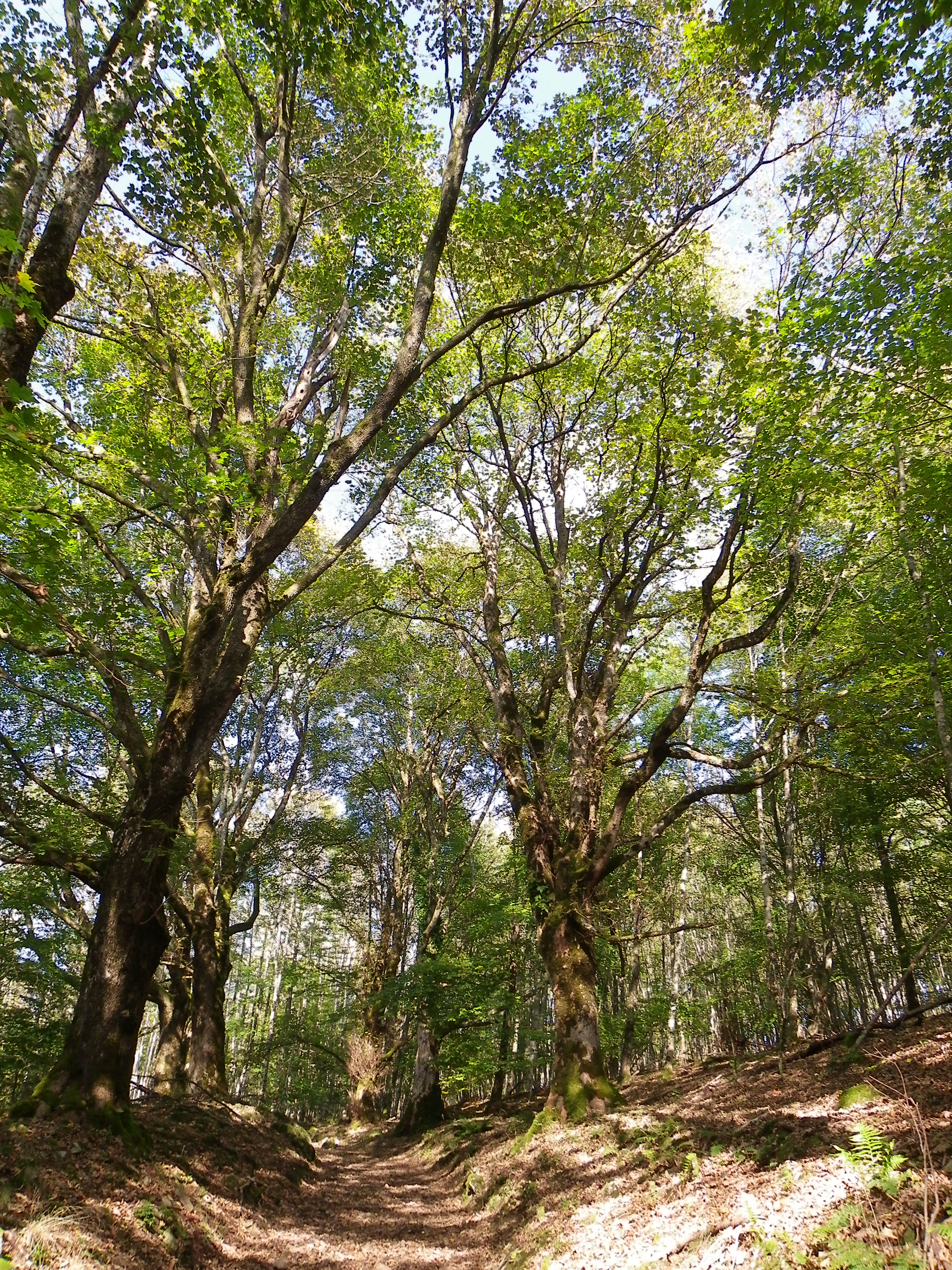 Waldersbach Allée des fiançés (à droite après le cimetière vers le col de la Perheux)